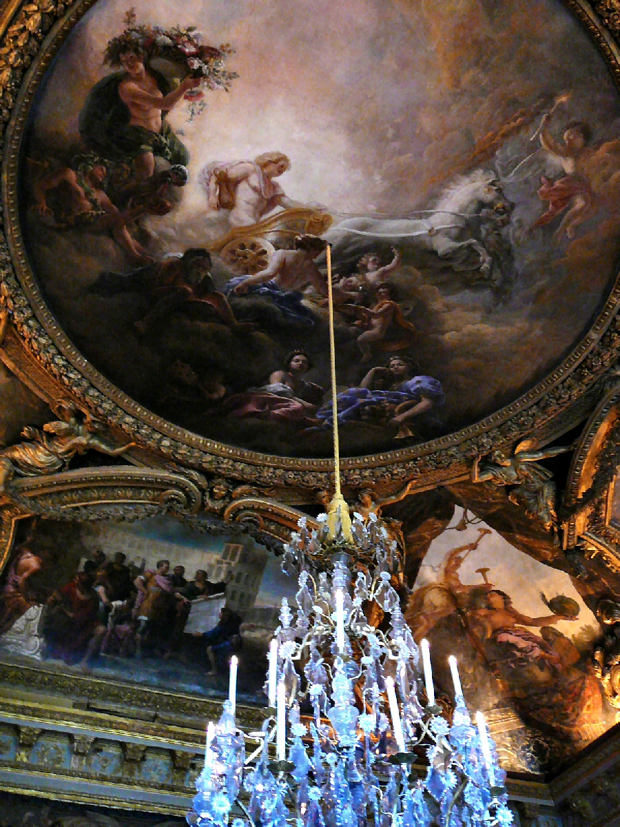 Plafond du Salon d'Apollon /Ceeling in Salon d'Apollon. Phoebus. Château de Versailles, Yvelines, Ile de France, France.